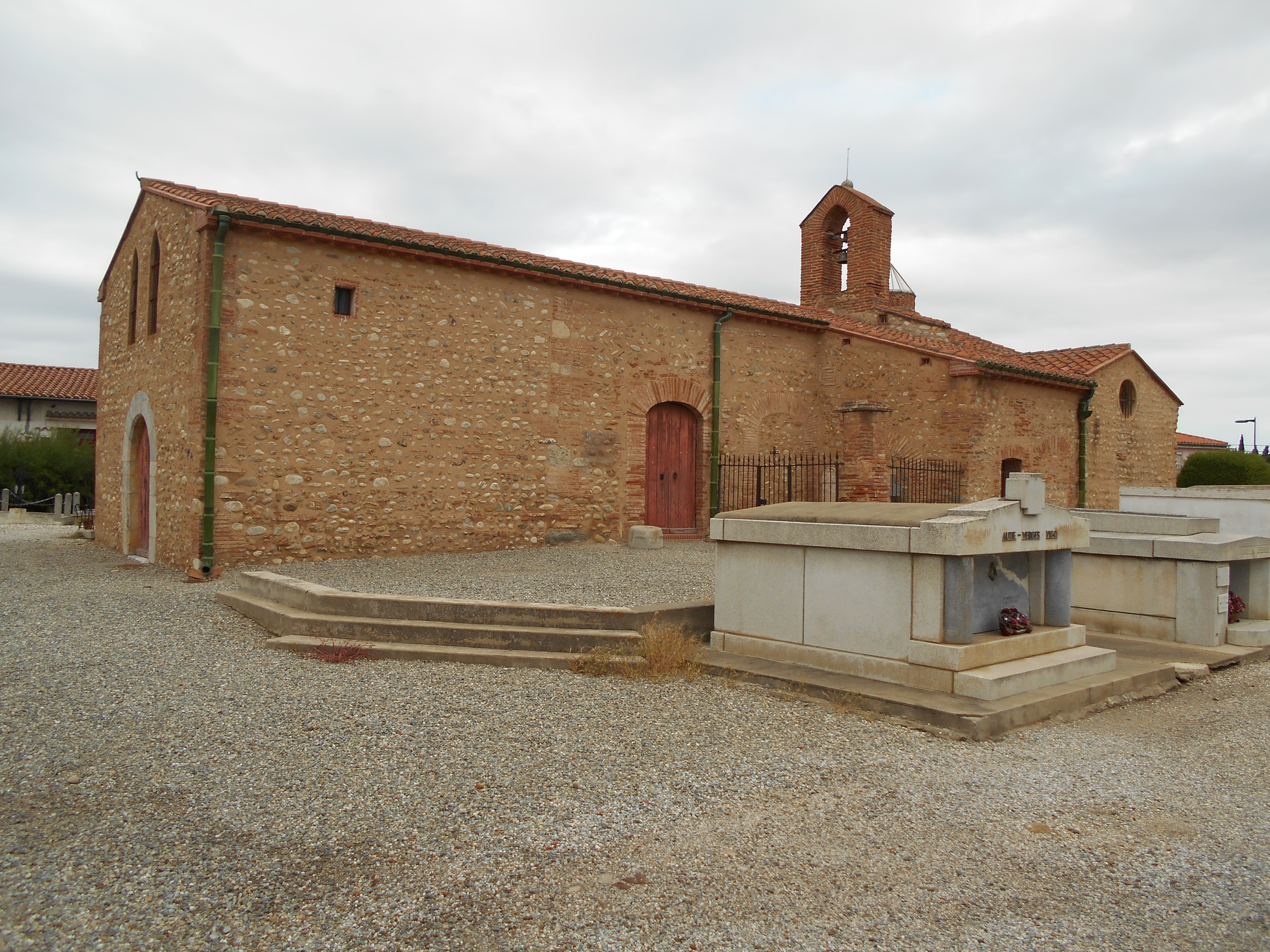 Façana de migdia